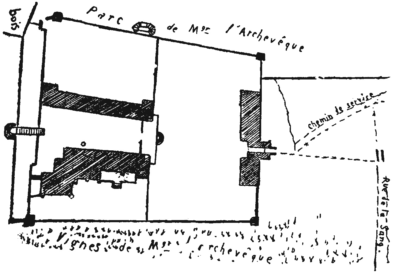 Skizzierter Lageplan des Schlosses Lormont mit dem Baubestand vor der Französischen Revolution